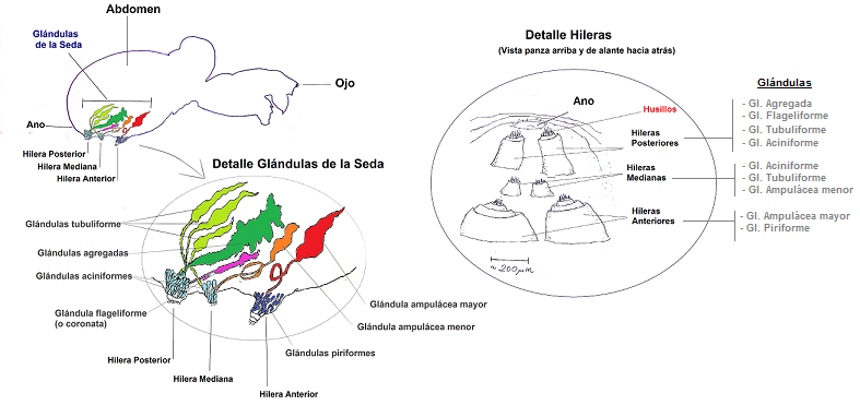 Situación de las hileras y los husillos en relación con la anatomína general de la araña. Detalle de lás glándulas productoras de seda y de las hileras